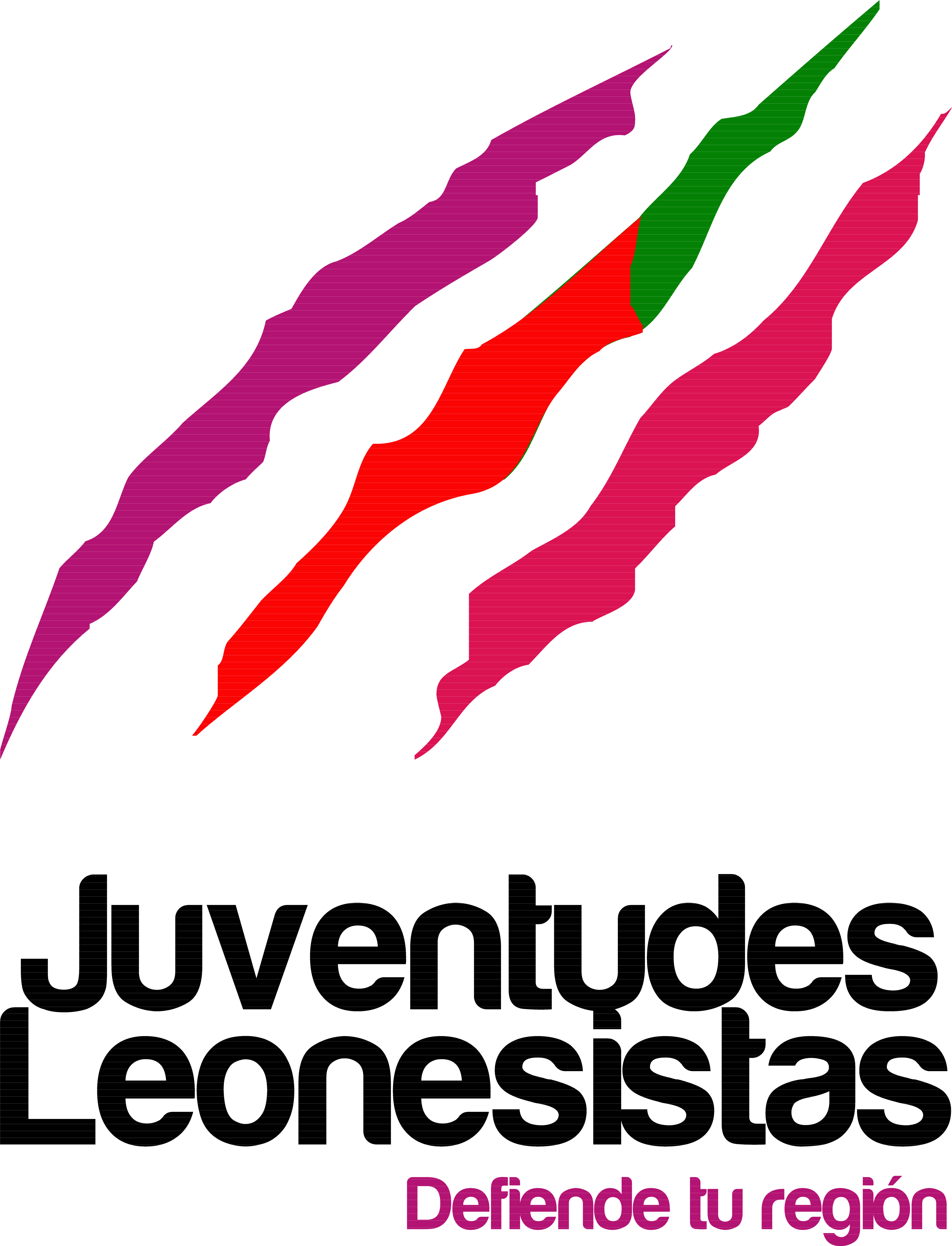 logotipo oficial de Juventudes Leonesistas